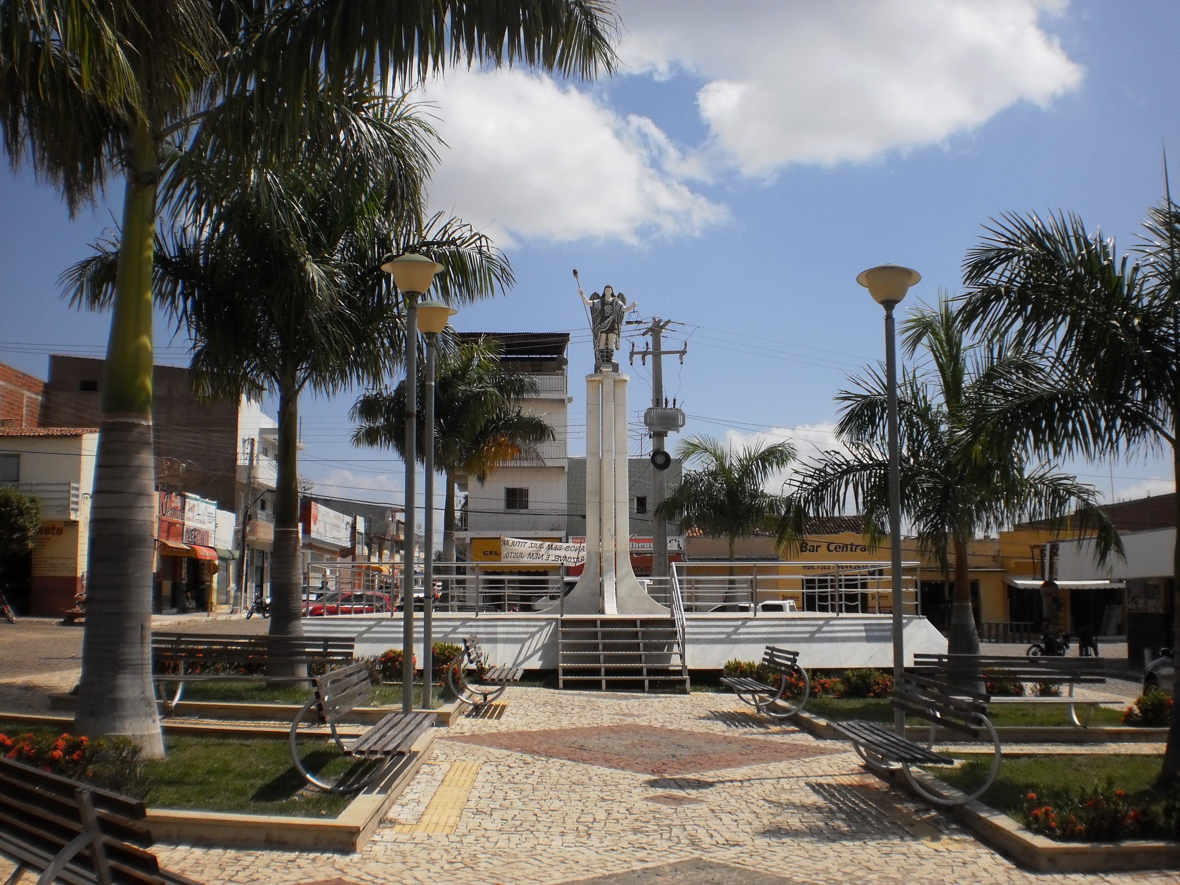 Estátua de São Miguel Arcanjo na Praça 7 de Setembro, São Miguel, Rio Grande do Norte, Brasil.